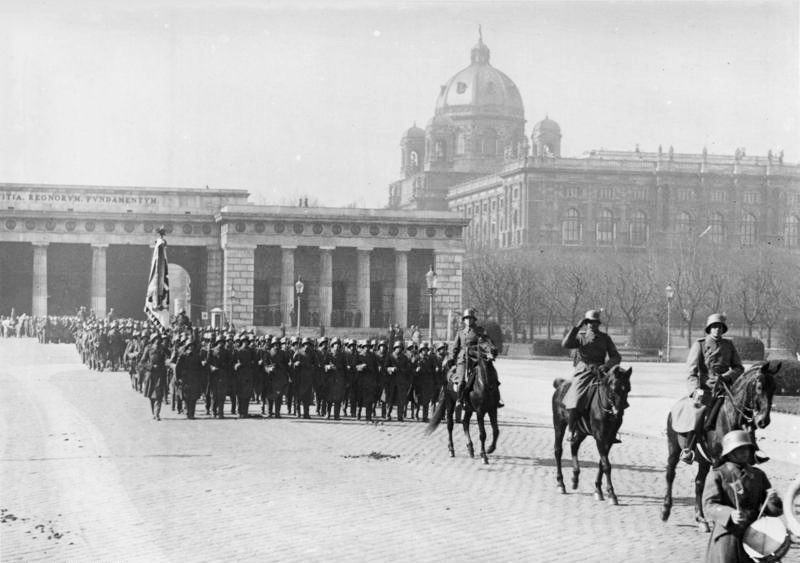 Die 10 Jahrfeier des oesterreichischen Bundesheeres! Der grosse Aufmarsch des oesterreichischen Bundesheeres anlässlich der 10 Jahr-Feier zur Parade auf dem Heldenplatz in Wien. Information added by Wikimedia users.